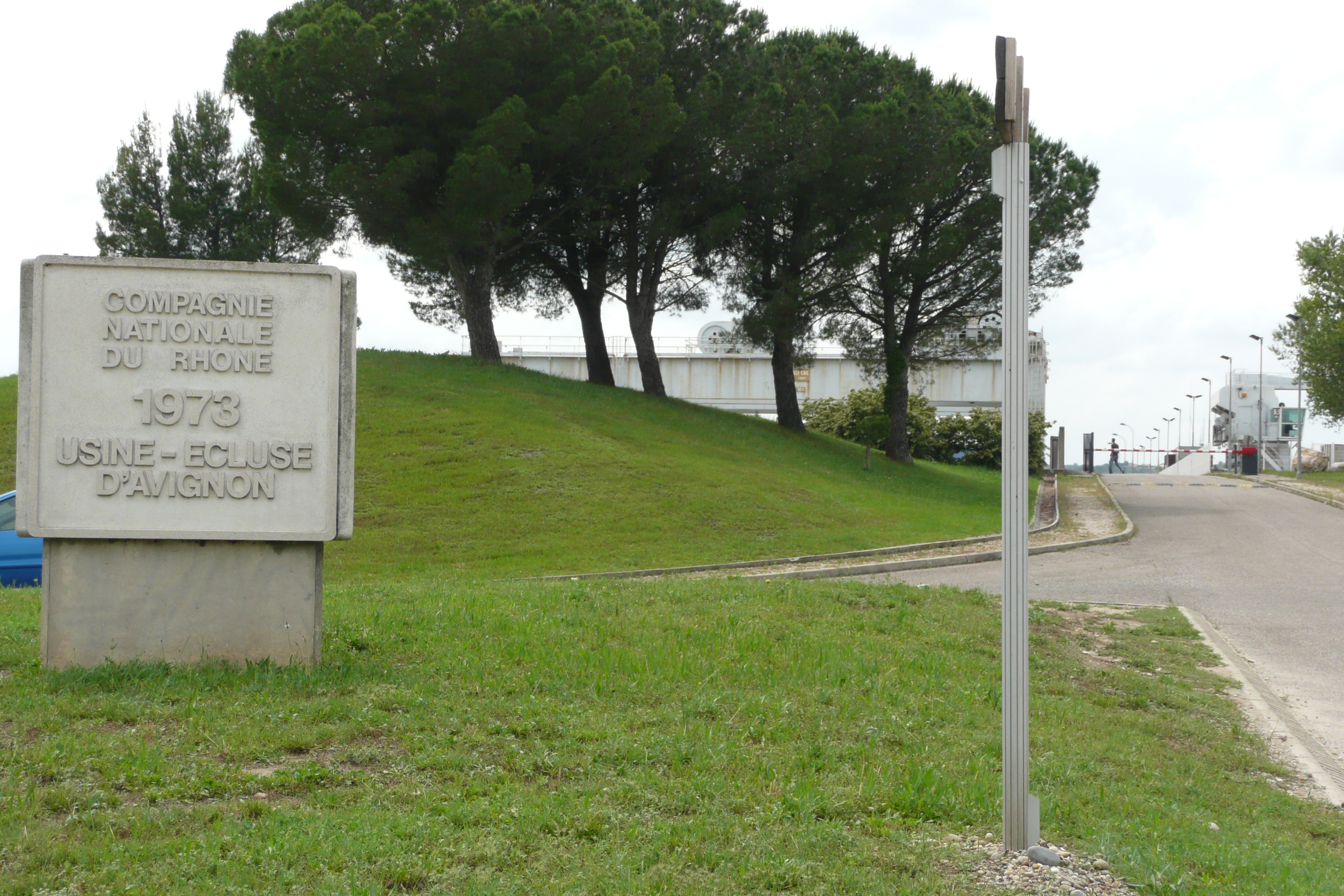 Compagnie nationale du Rhône, 1973, usine écluse d'Avignon le 31 mai 2008 avec une hauteur de 4,0 mètres d'eau.